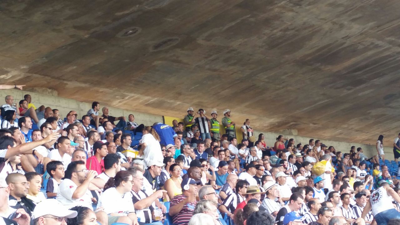 Português do Brasil: Torcida do Goiânia em 2015.